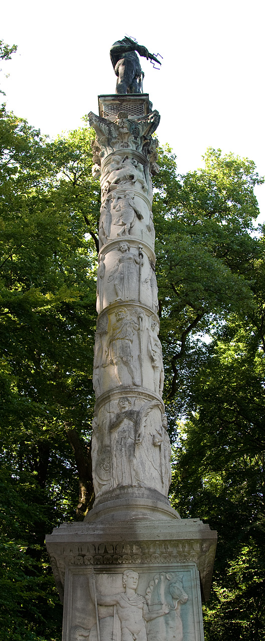 Große Mainzer Jupitersäule - Abbildungen auf den Säulentrommeln (Rekonstruktion Große Mainzer Jupitersäule Saalburg)